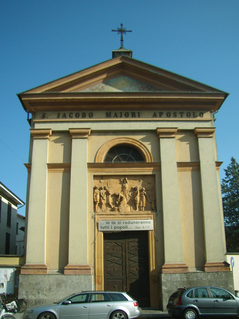 Facciata della chiesa di San Giacomo Apostolo a Lodi.